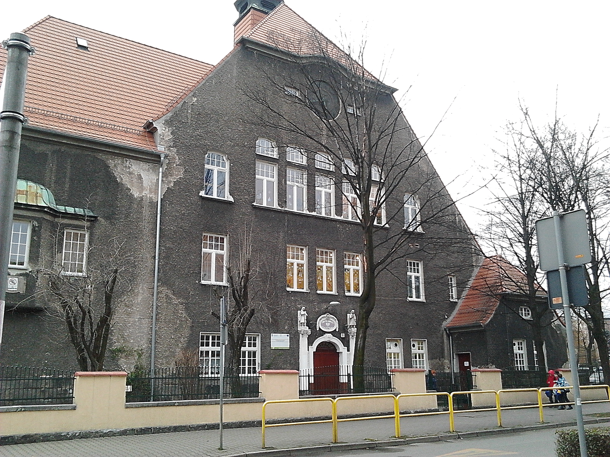 SP2, Jelenia Góra, ul. Armii Krajowej 8